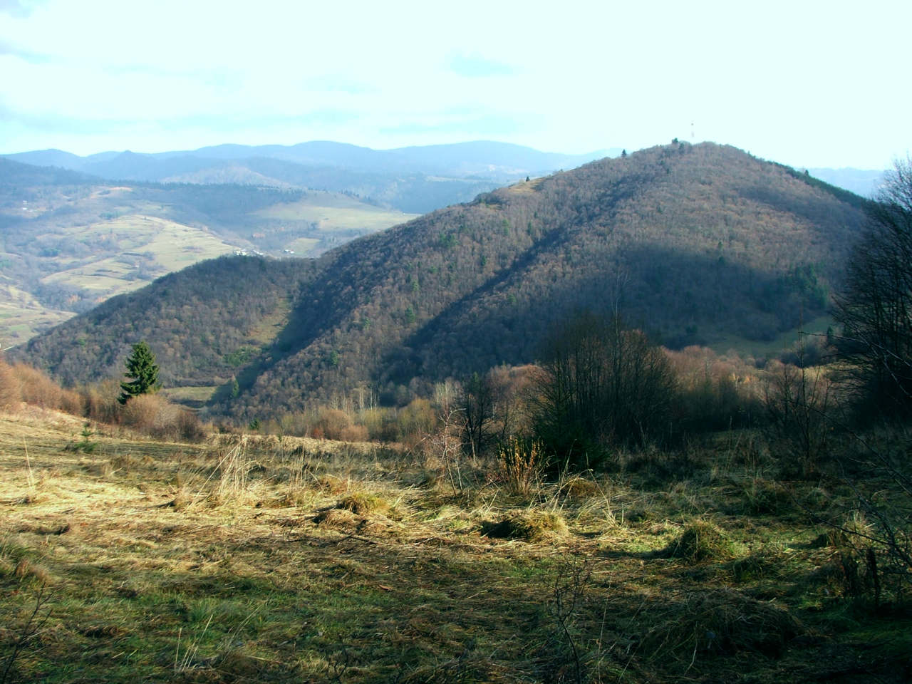 Jarmuta, Jarmutka (Małe Pieniny)